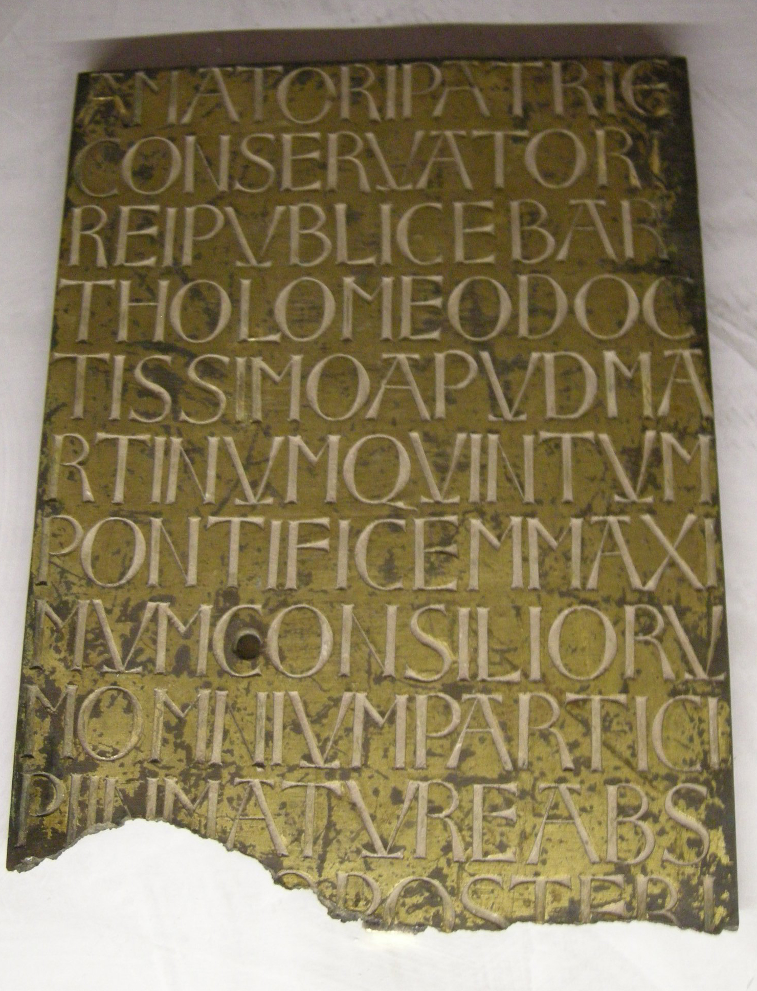 Michelozzo, epigrafe del munumento aragazzi, 1437-38, montepulciano, palazzo vescovile